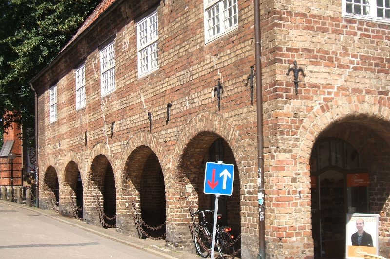 Skrangerne ved Nørretorvet i Flensborg.